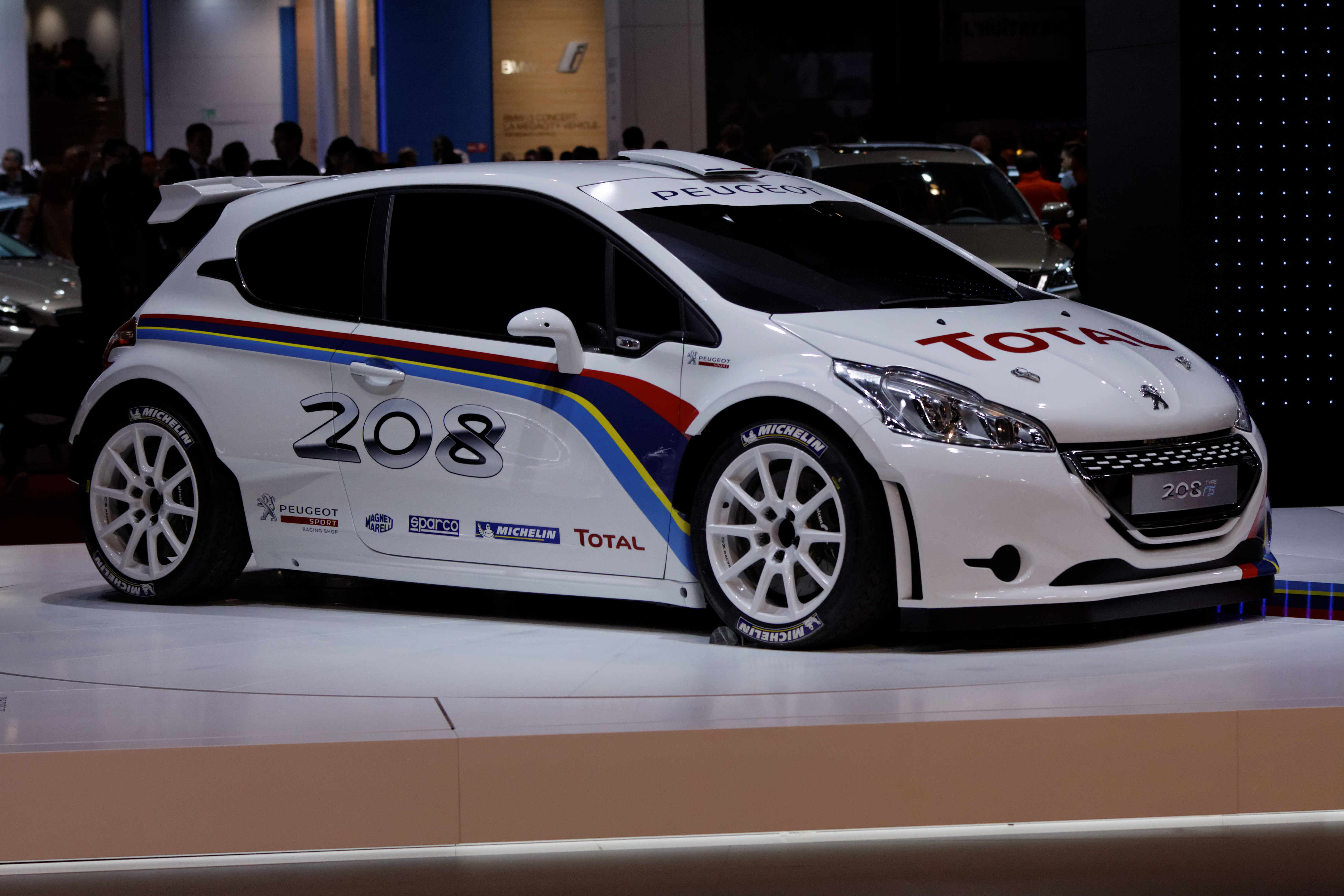 Une Peugeot 208 R5 présentée lors du Mondial de l'Automobile de Paris 2012.